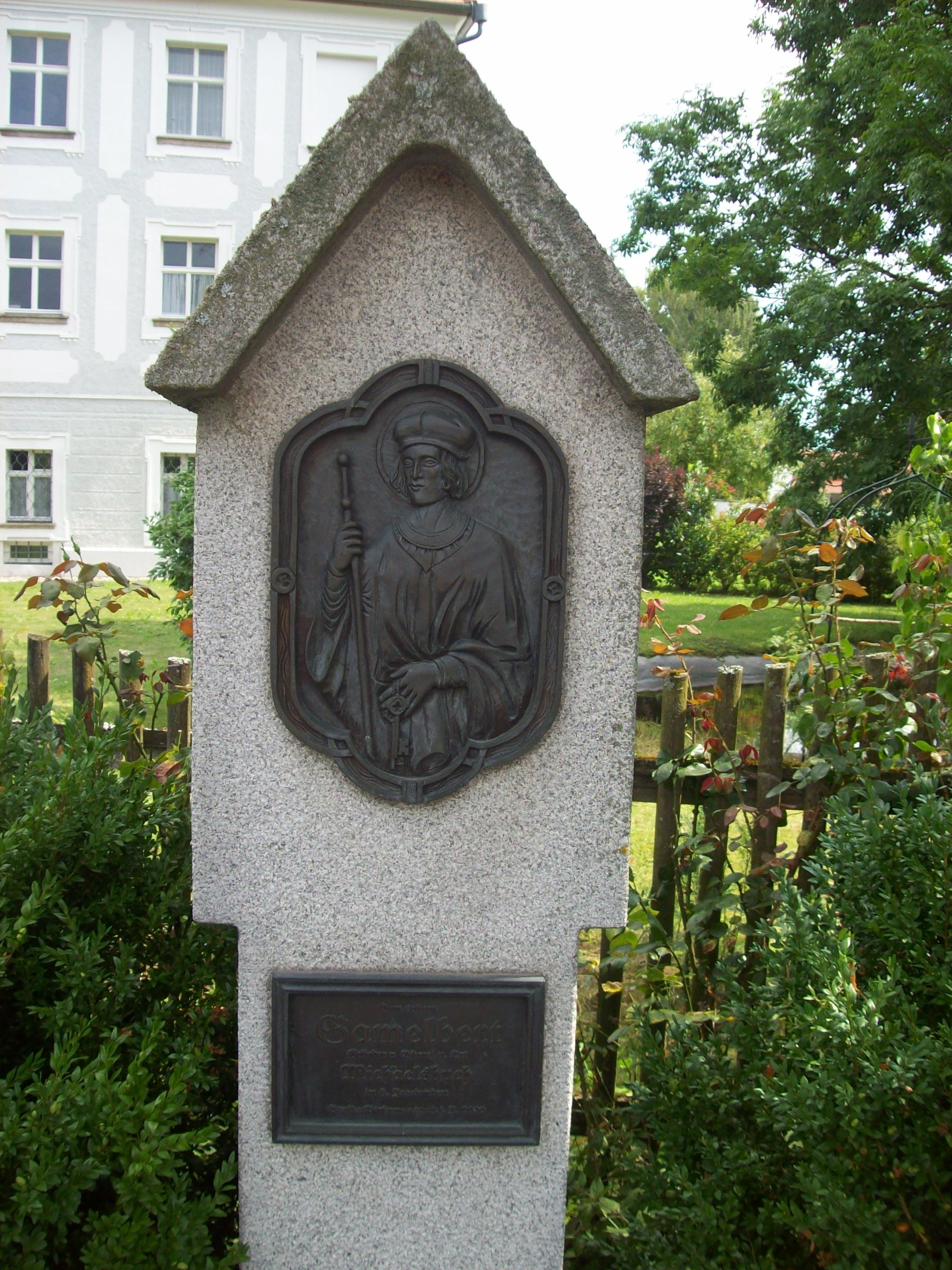 Michaelsbuch, St.-Michaelsplatz: Gedenkstein für den seligen Gamelbert (Gerhart Brauße, Steinkirchen)